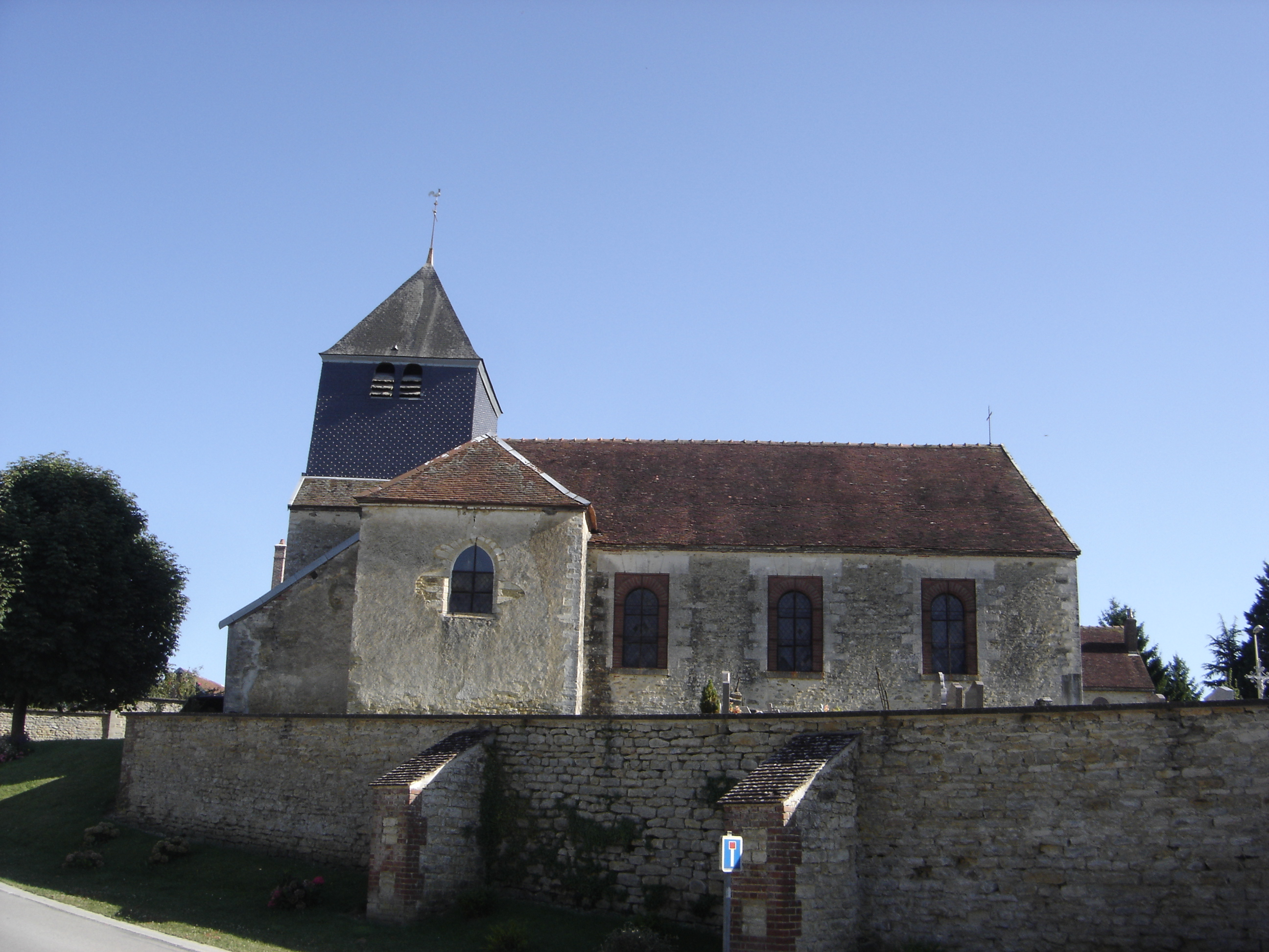 Eglise Saint Maurice - Briel sur Barse - Aube - France